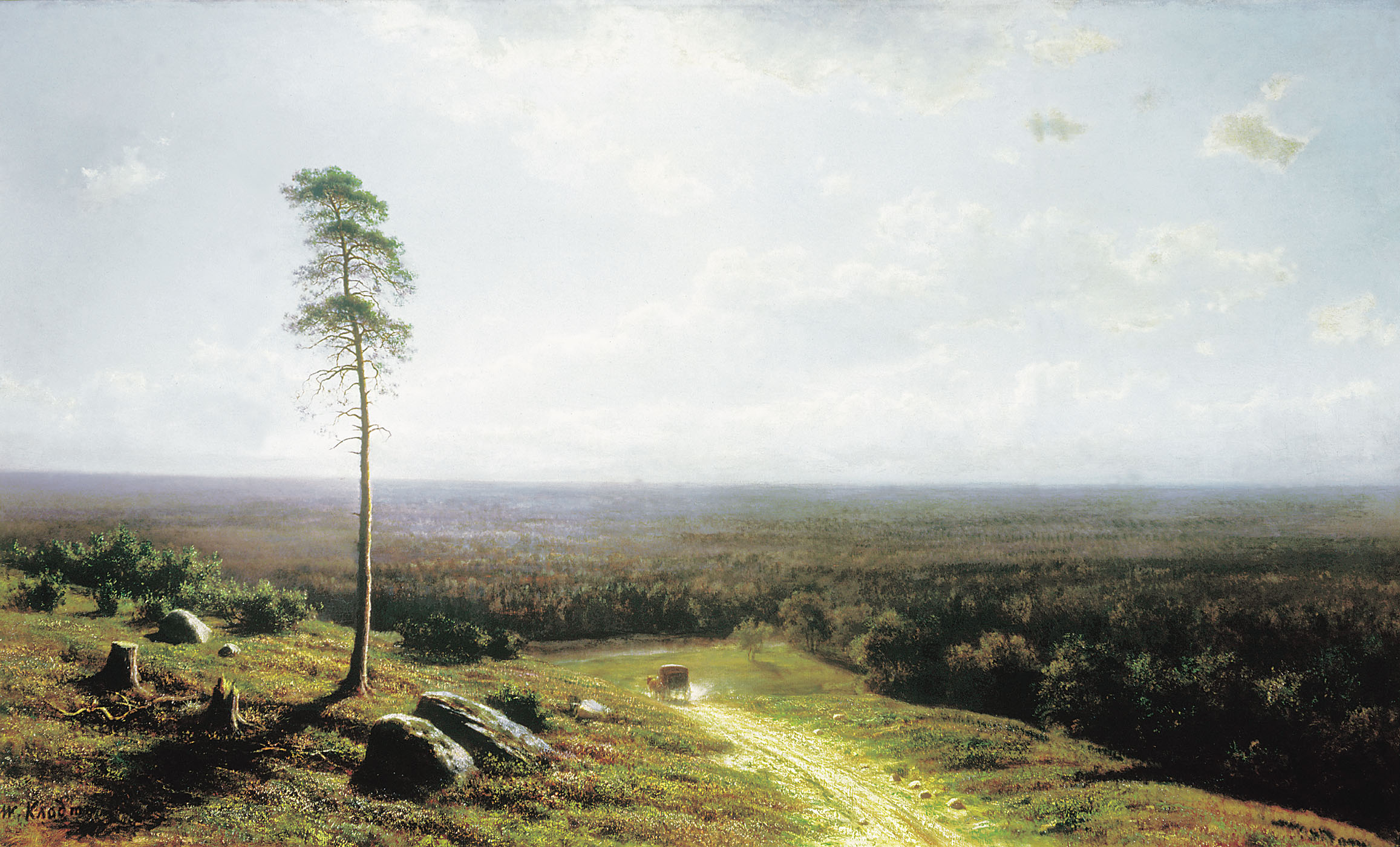 Лесная даль в полдень. 1878, холст, масло, 93х157 см